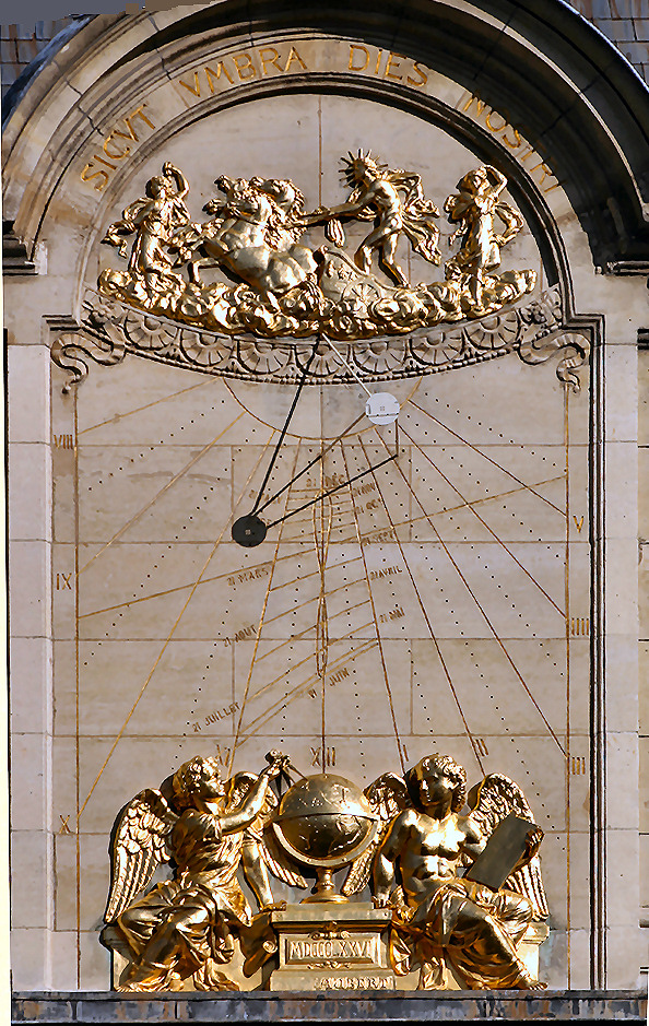 Cadran solaire de Jean Picard au fronton de la Sorbonne.